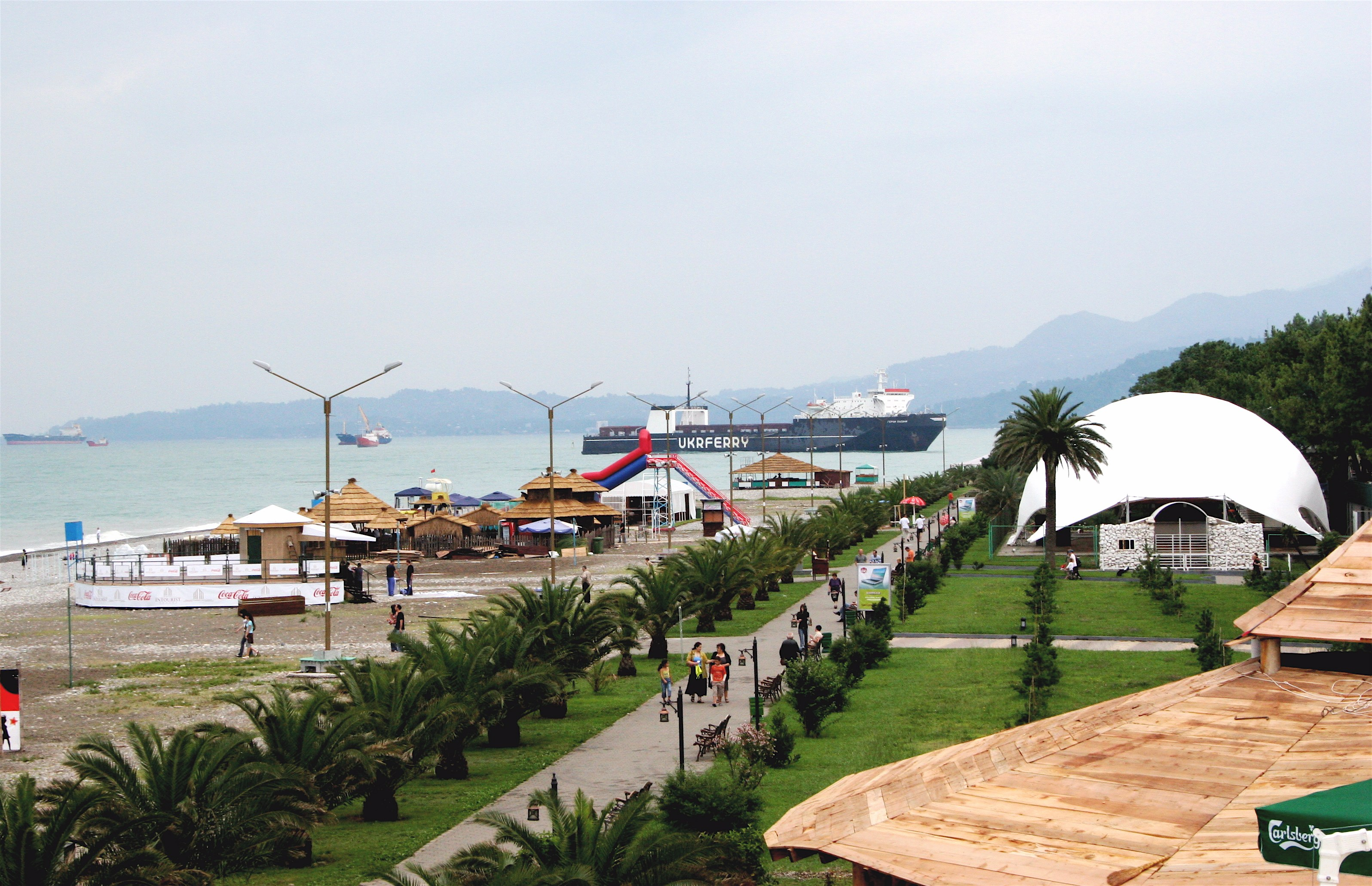 Batumi Plage (boulevard)